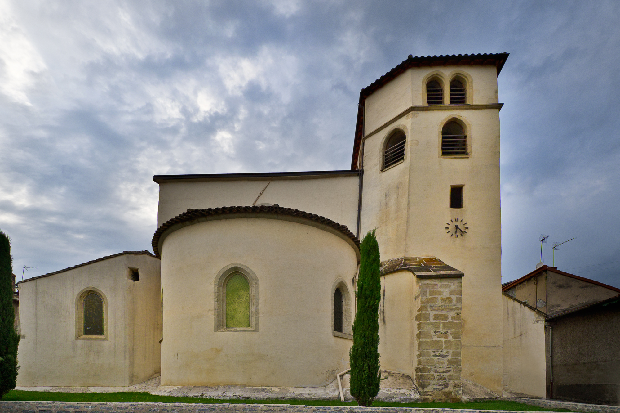 Église Saint-Symphorien de Saint-Symphorien-d'Ozon, Rue Claude-ColombièreRue de l'ÉgliseRue des DauphinsPlace du Marché (Inscrit, 2001) .